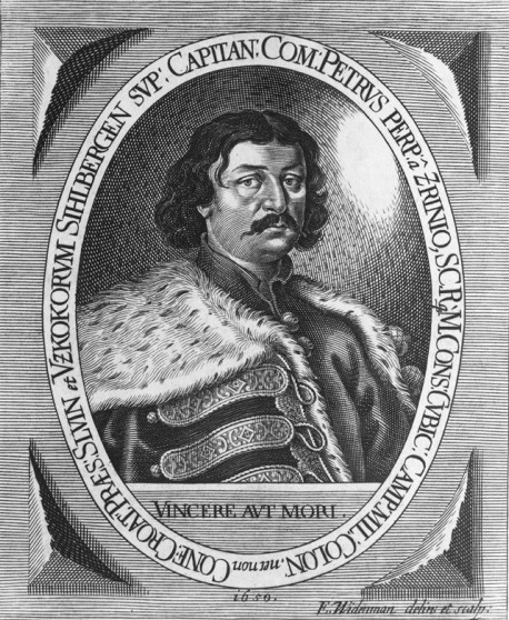 Zrínyi Péter (1621–1671) portréja. Elias Widemann rézmetszete (1650)